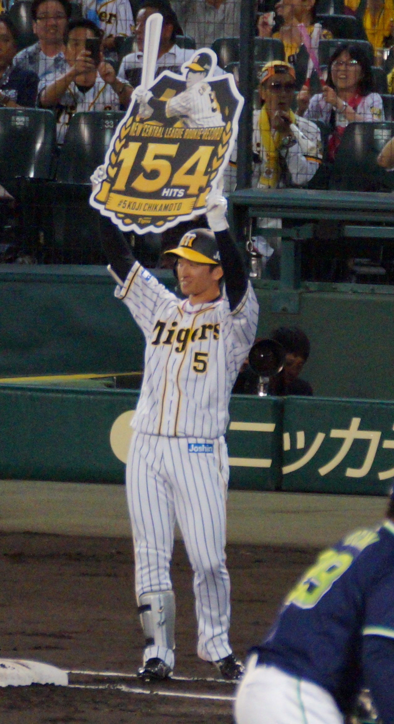 2019年9月19日 阪神甲子園球場にて セントラル・リーグ新人最多安打記録を更新